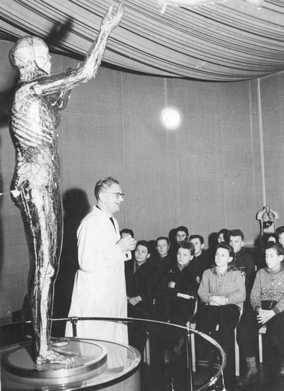 Dresden, Jugendstunde im Deutschen Hygiene-Museum Zentralbild Löwe Vgt-Noa 8.2.1958 Teilnehmer der Jugendweihe besuchen Zentralinstitut für medizinische Aufklärung Innerhalb der Vorbereitungsstunden für die Jugendweihe besuchten Kinder des Dresdner Stadtbezirkes Ost die Ausstellung im Deutschen Hygiene-Museum Dresden - Zentralinstitut für medizinische Aufklärung, wo sie die Entwicklung des Menschen kennen lernten. UBz: Herr Brunner vom Hygiene-Museum erklärt den Jungen die "Gläserne Frau".